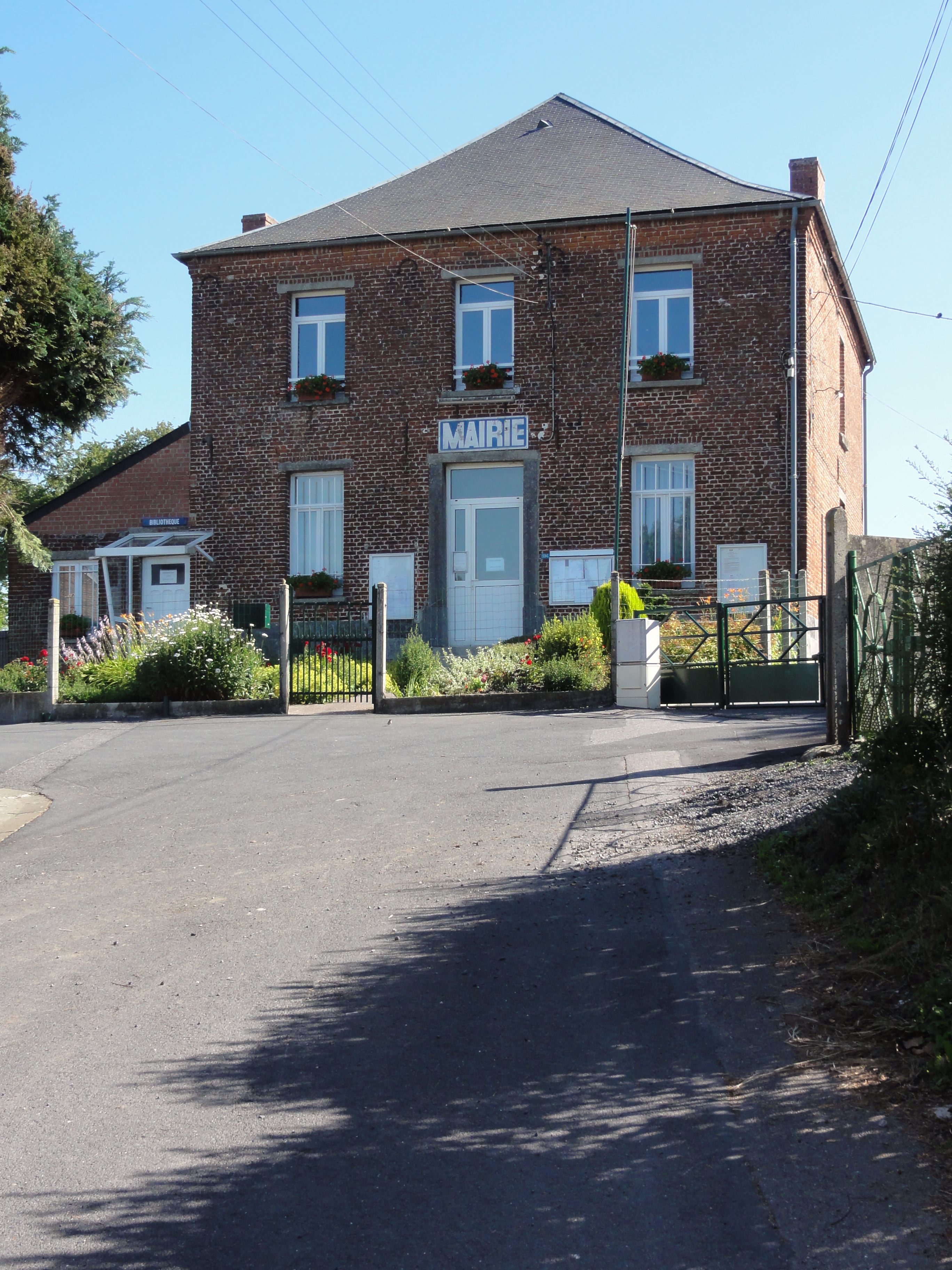 Mecquignies (Nord, Fr) mairie